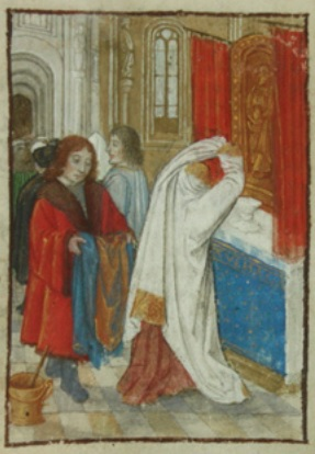 Ablegen der liturgischen Gewänder (miniatur), Gebet- und Messbuch, msc.0015, 168v